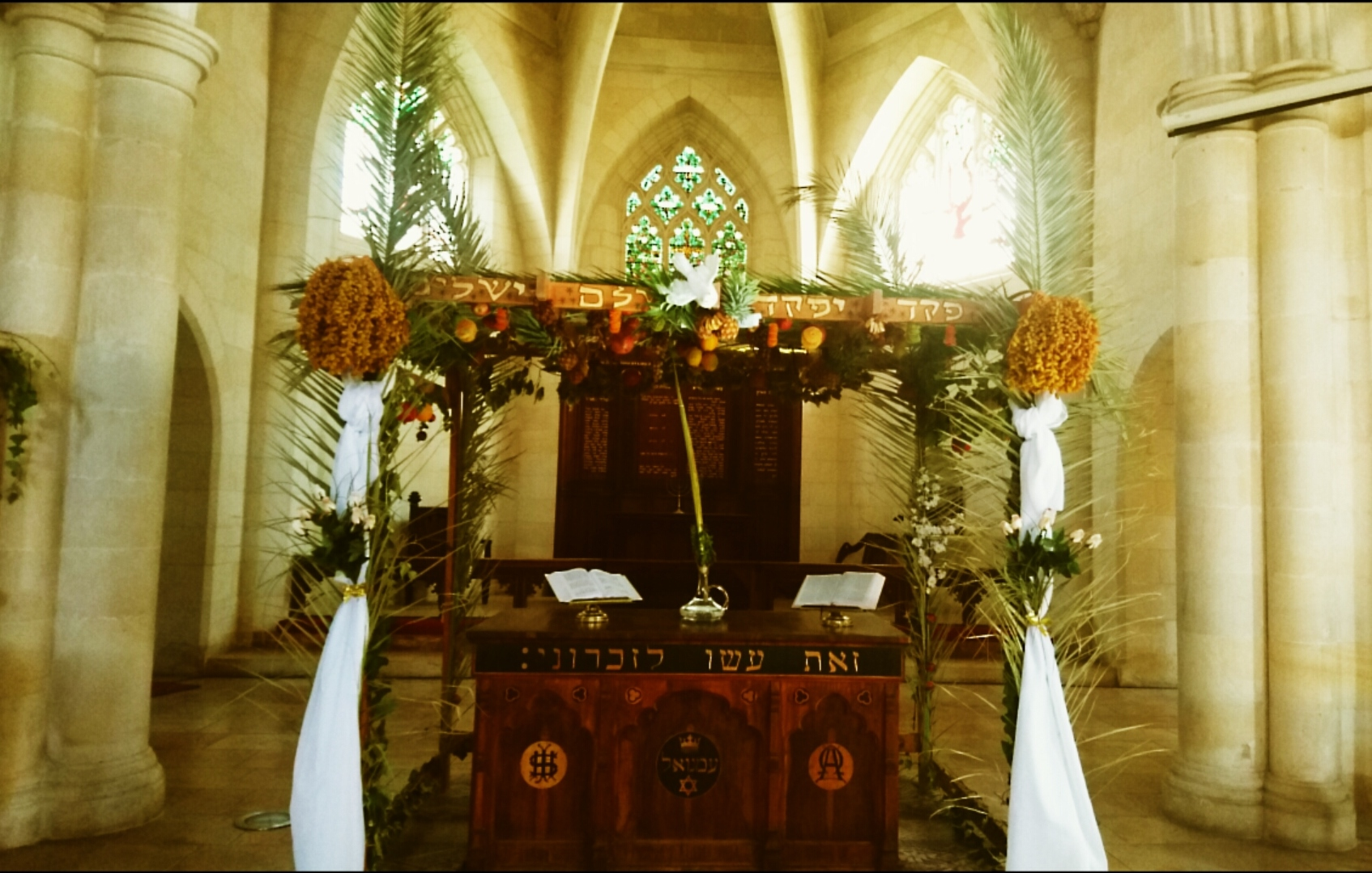 כנסיית המשיח או כנסיית עמנואל היא כנסייה אנגליקנית ליד הרובע הארמני בירושלים, מול מגדל דוד. הייתה הכנסייה הפרוטסטנטית הראשונה במזרח התיכון. הכנסייה, שמקורותיה מיסיונרים מובהקים, שייכת כיום לחלק מהפלג האנגליקני-אוונגליסטי המקורב לחוגי נוצרים ידידי ישראל.